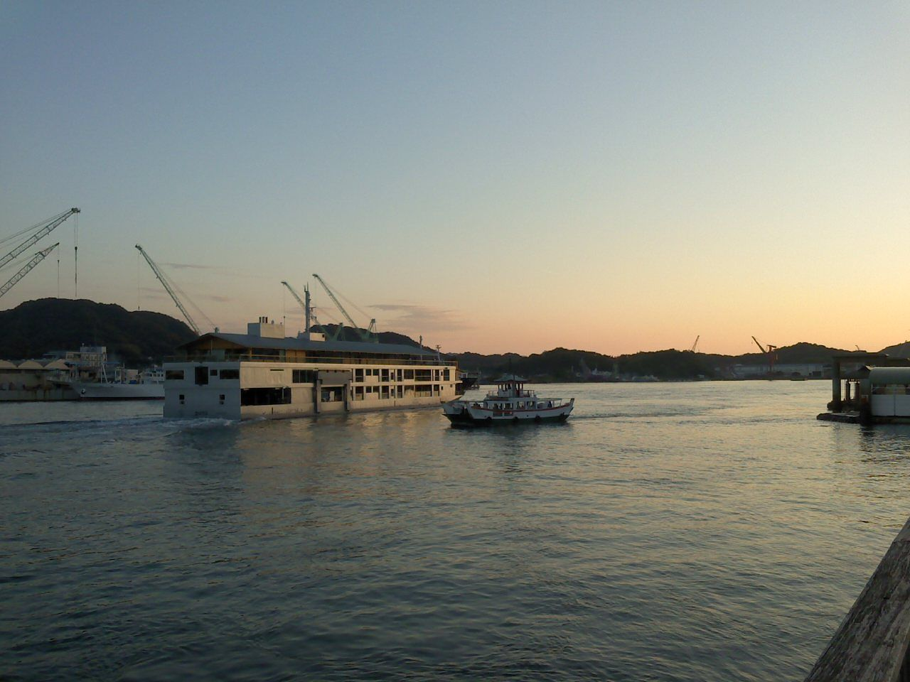 船の画です